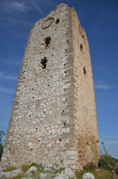 Δίδυμοι Πύργοι Μύτικας Ευβοίας ( 1ος Πύργος )